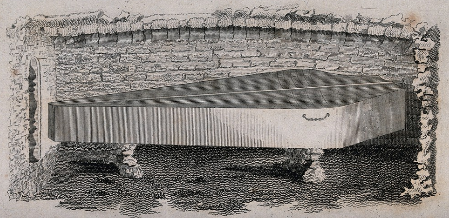 Аҧсшәа: bones image